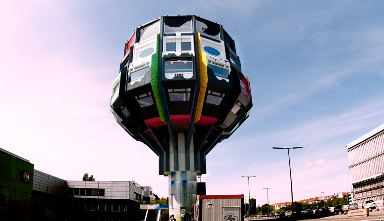 Der Bierpinsel in Berlin Steglitz